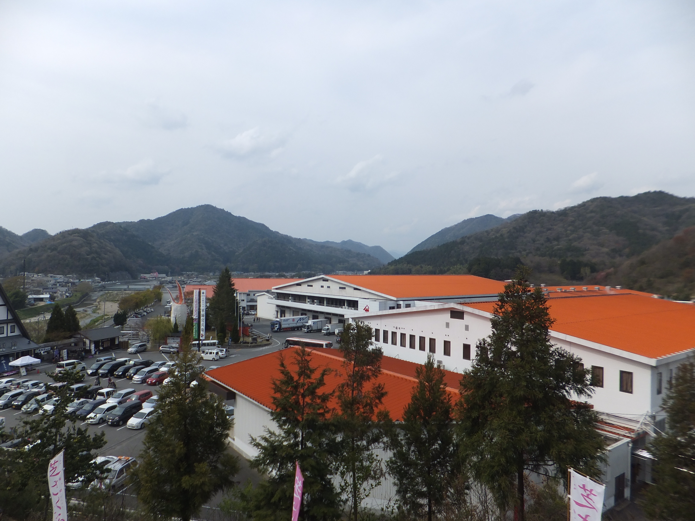 ヤマサ蒲鉾夢前工場